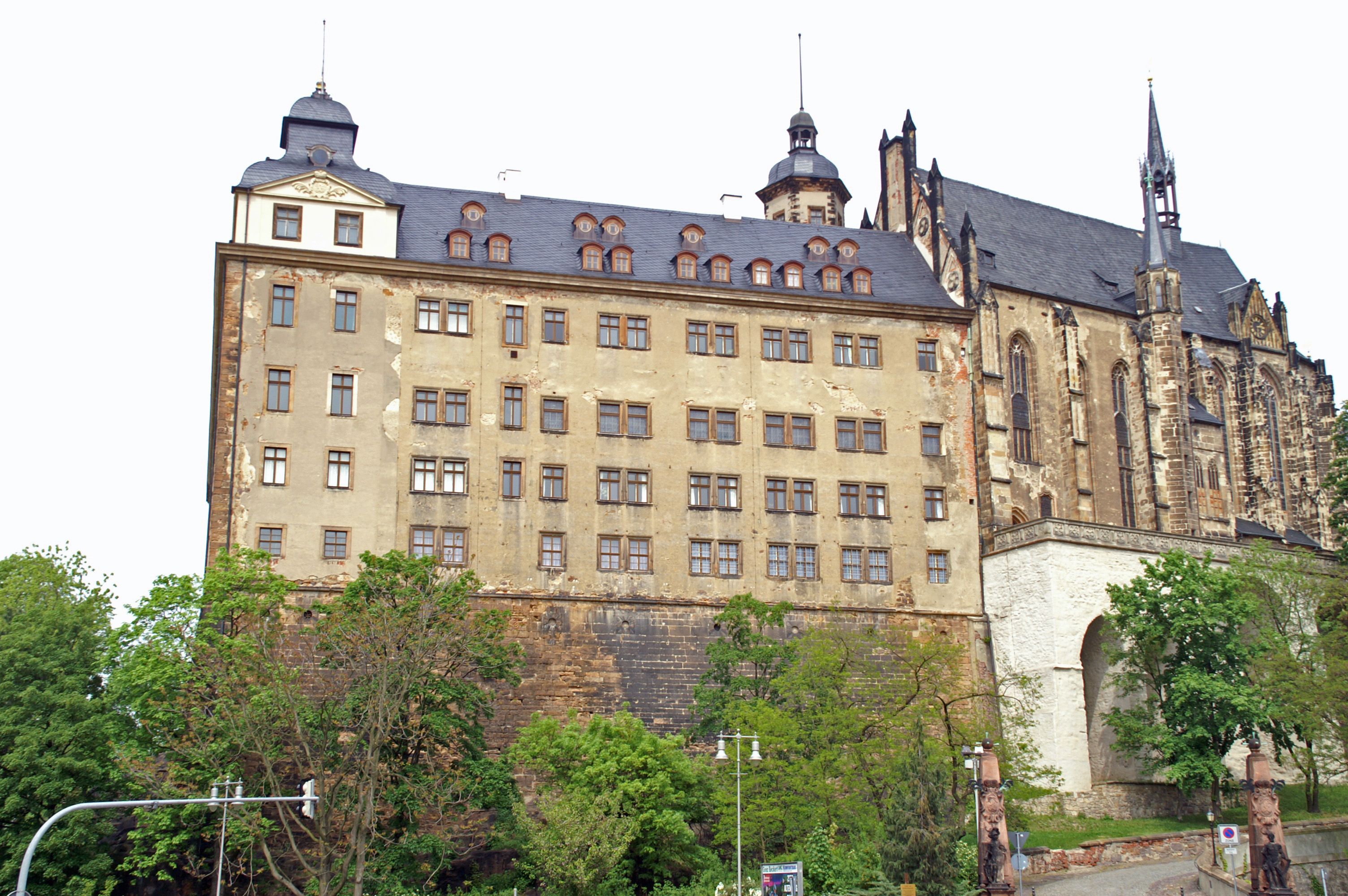 Castle in Altenburg, Germany